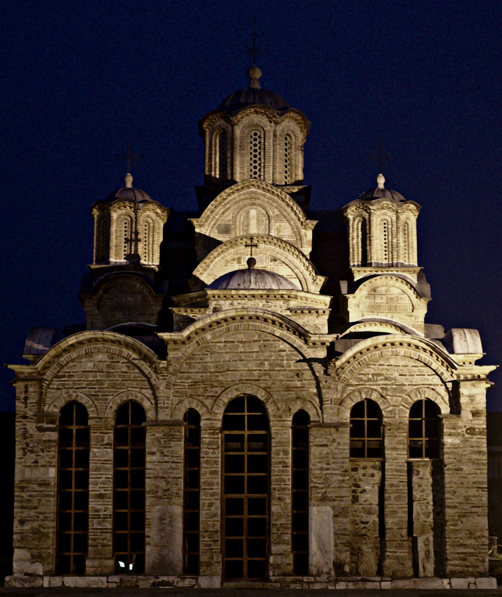 Gračanica